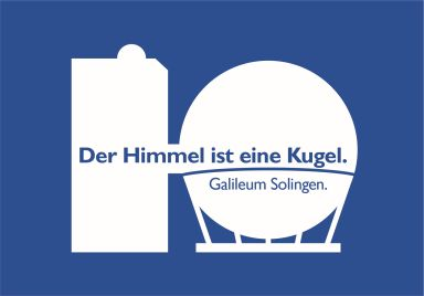 Das "Key Visual" des zukünftigen Galileum Solingen mit der Silhoutte des Gasbehälters